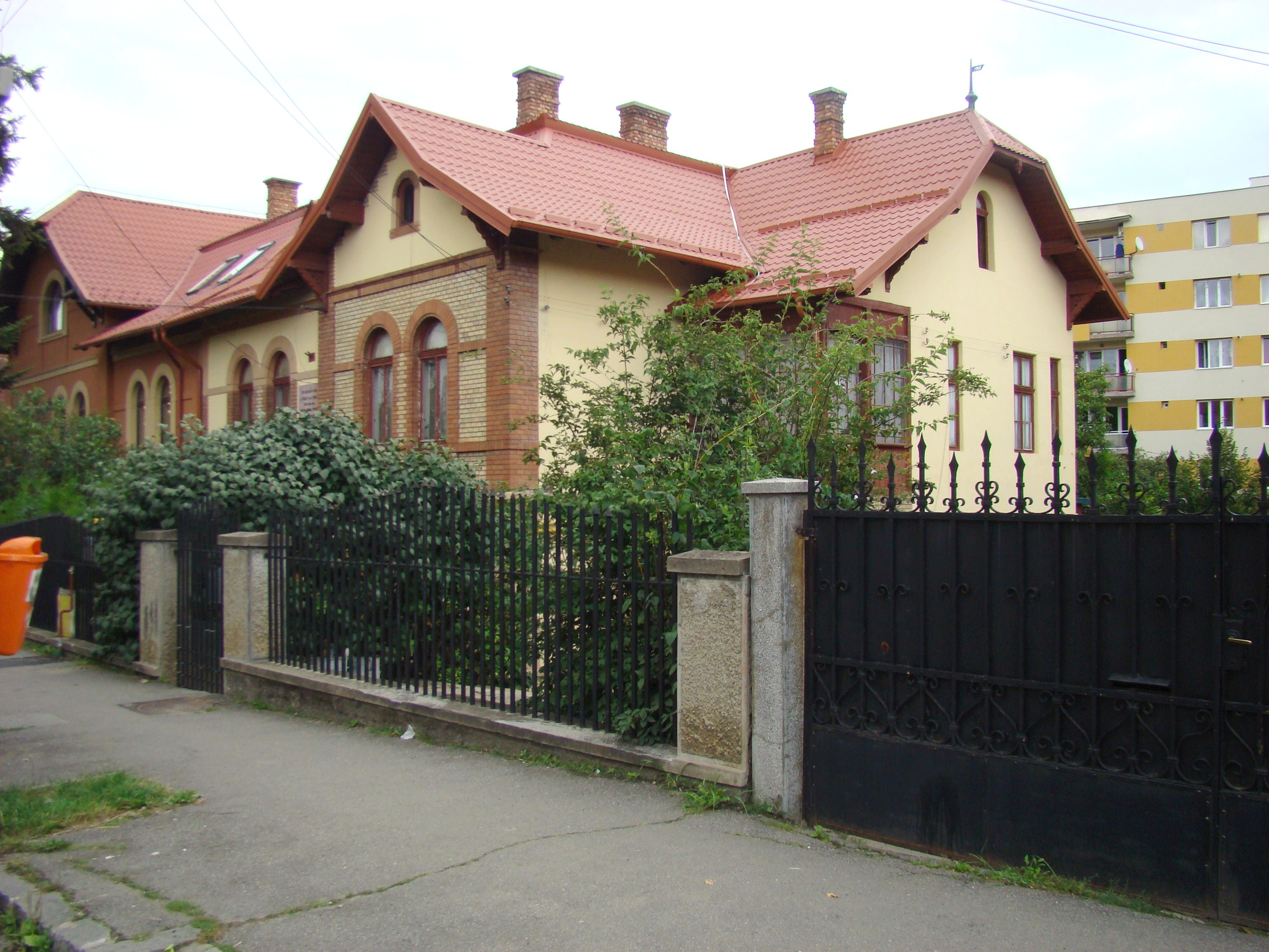 Clădire monument istoric, str.Andrei Mureșanu, nr.31 (Casa în care a trăit Ion Agârbiceanu)